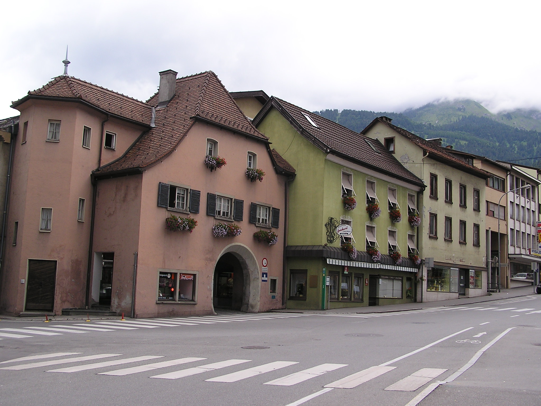 Bludenz Unteres Stadttor Ort & Datum: 5.8.2006